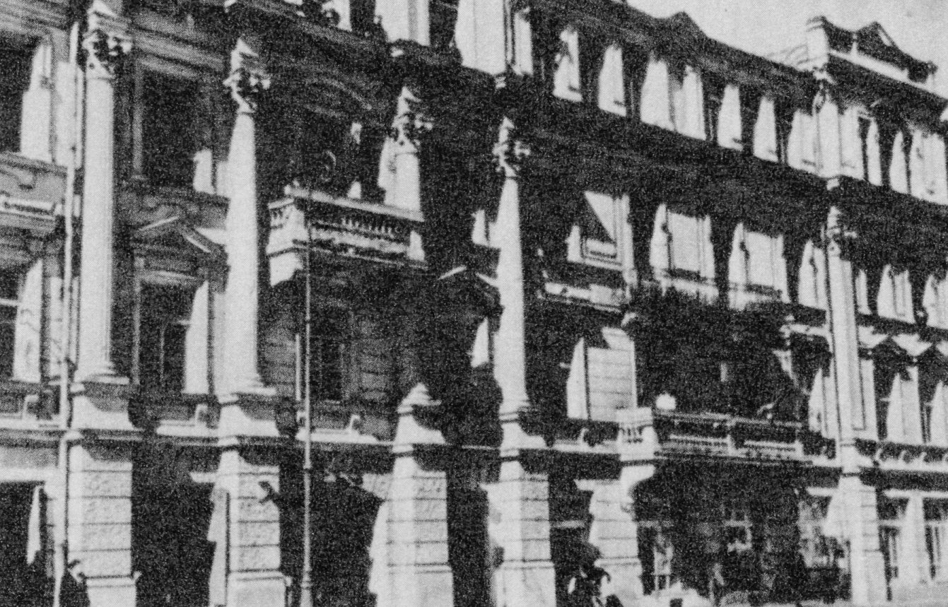 Беларуская (тарашкевіца): Дом у Вільні, дзе размяшчаўся рабочы клюб «Сокал», у якім 27 студзеня 1913 году адбылася першая пастаноўка п'есы Янкі Купалы «Паўлінка»